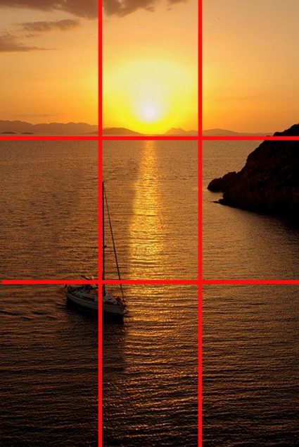 Fotoğrafçılıkta altın oran